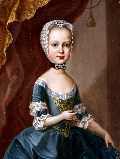 Nicht identifizierter Künstler, ev. Erzherzogin Marie Christine (1742–1798): Erzherzogin Maria Theresia (1762–1770) in blauem Kleid mit weisser Spitzenhaube. Das einzige lebendgeborene Kind Kaiser Josephs II. (1741–1790 stammte aus dessen erster Ehe mit Prinzessin Isabella von Parma (1741–1763), die eine lesbische Beziehung mit ihrer Schwägerin Erzherzogin Marie Christine hatte. Öl auf Papier. Präsidentschaftskanzlei, Wien.